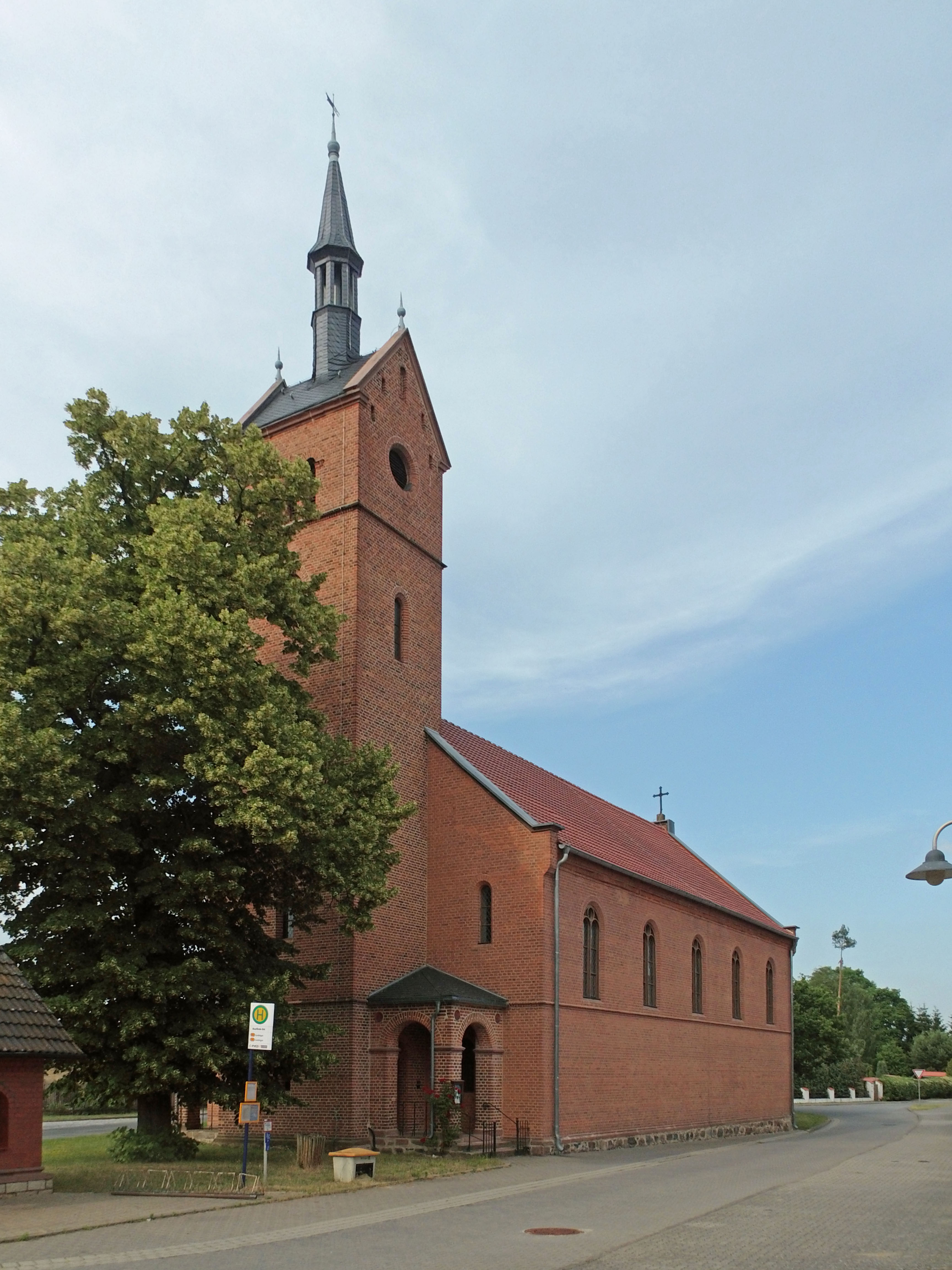 Evangelisch-lutherische Kirche in Roxförde (Sachsen-Anhalt)